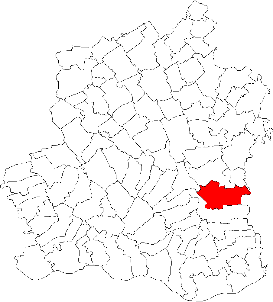 Categorie:Hărţi ale judeţului Teleorman